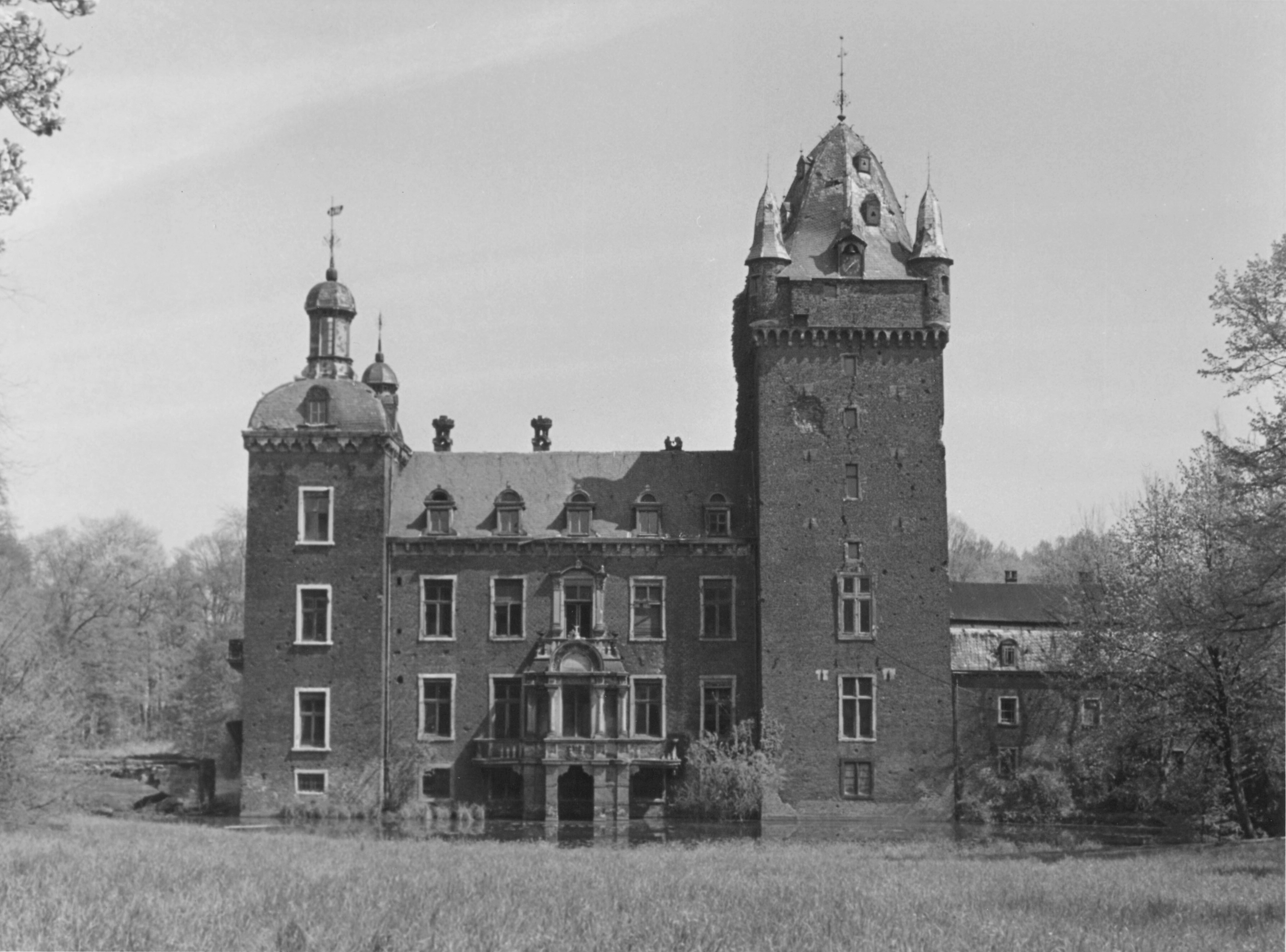 Schloss Harff im Bedburger Ortsteil Kaster. Zerstört durch den Rheinischen Braunkohletagebau